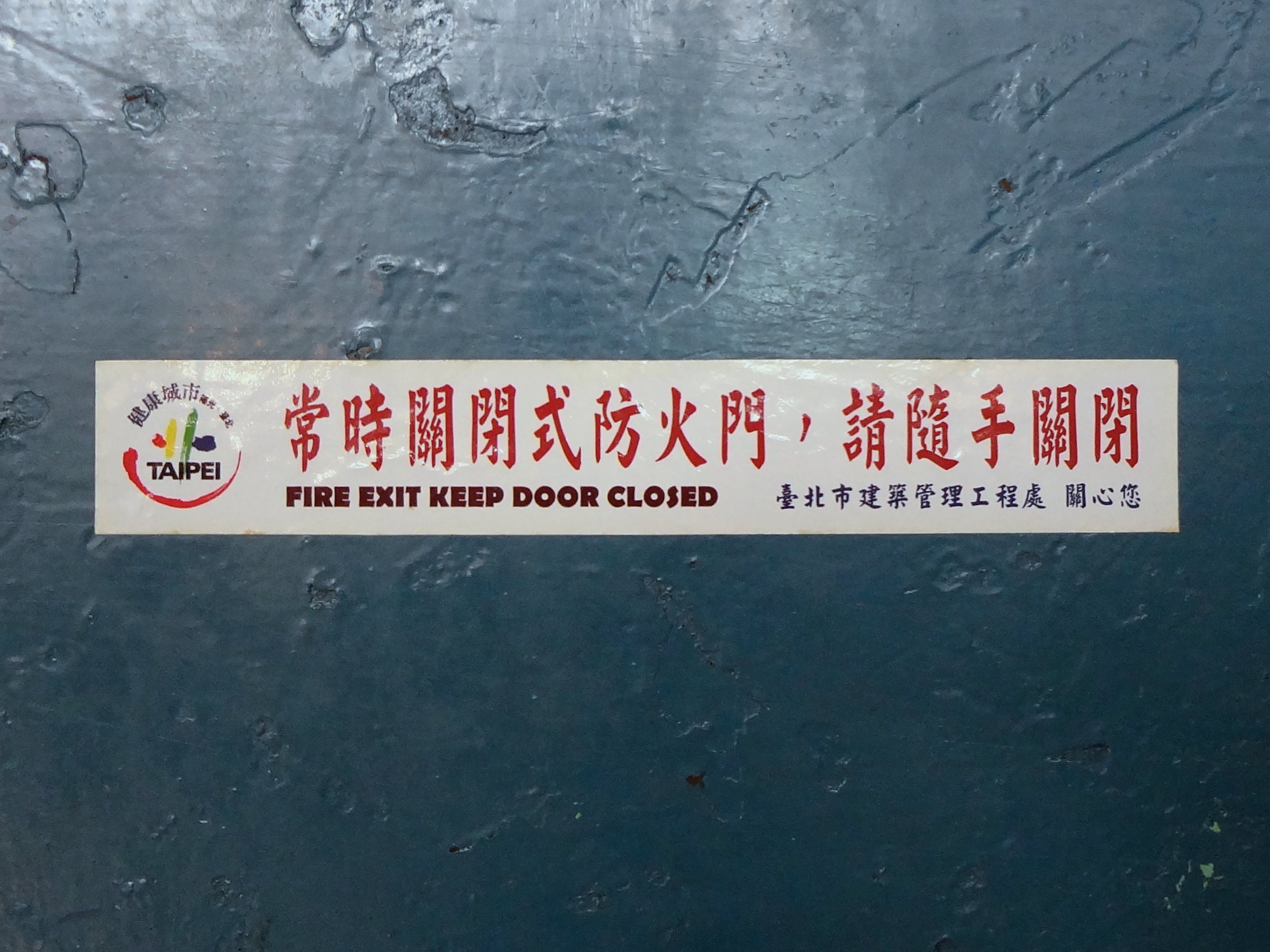 萬年商業大樓4樓防火門中央固貼的臺北市建築管理工程處「常時關閉式防火門，請隨手關閉」貼紙。